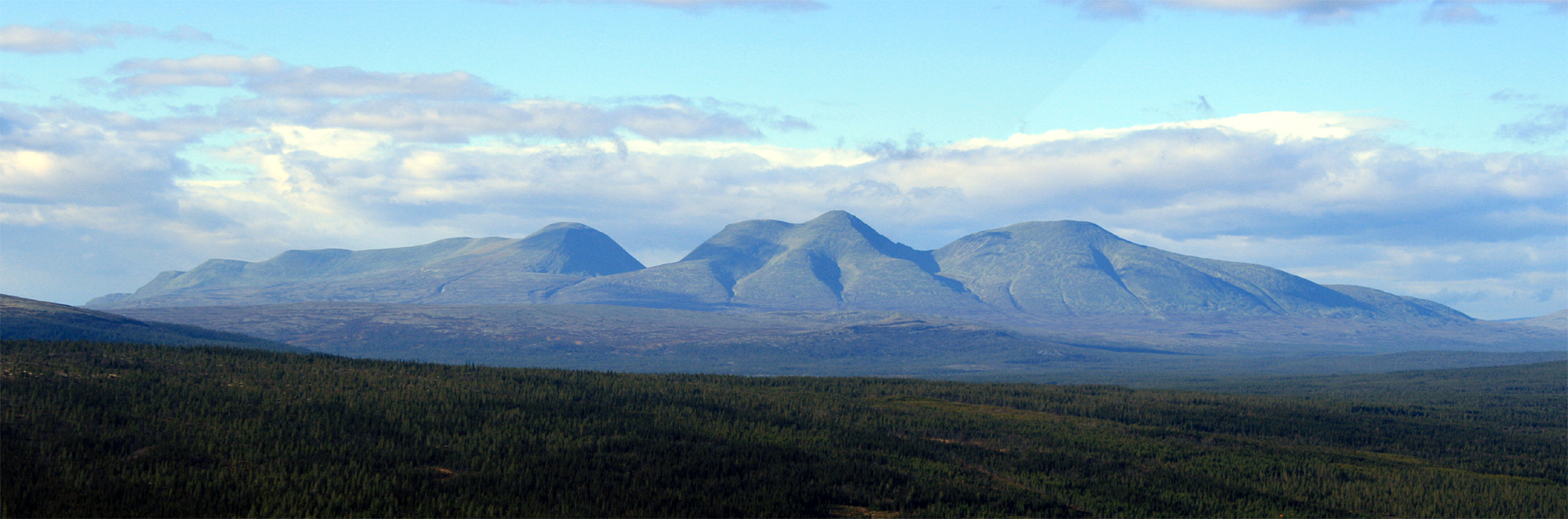 Søln, Rendalen, Norway, as seen from Engerdal (SE).